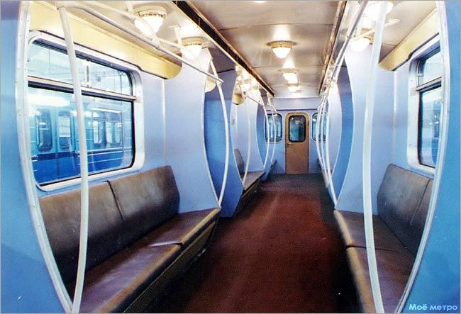 Салон экспериментального вагона ЕжТК